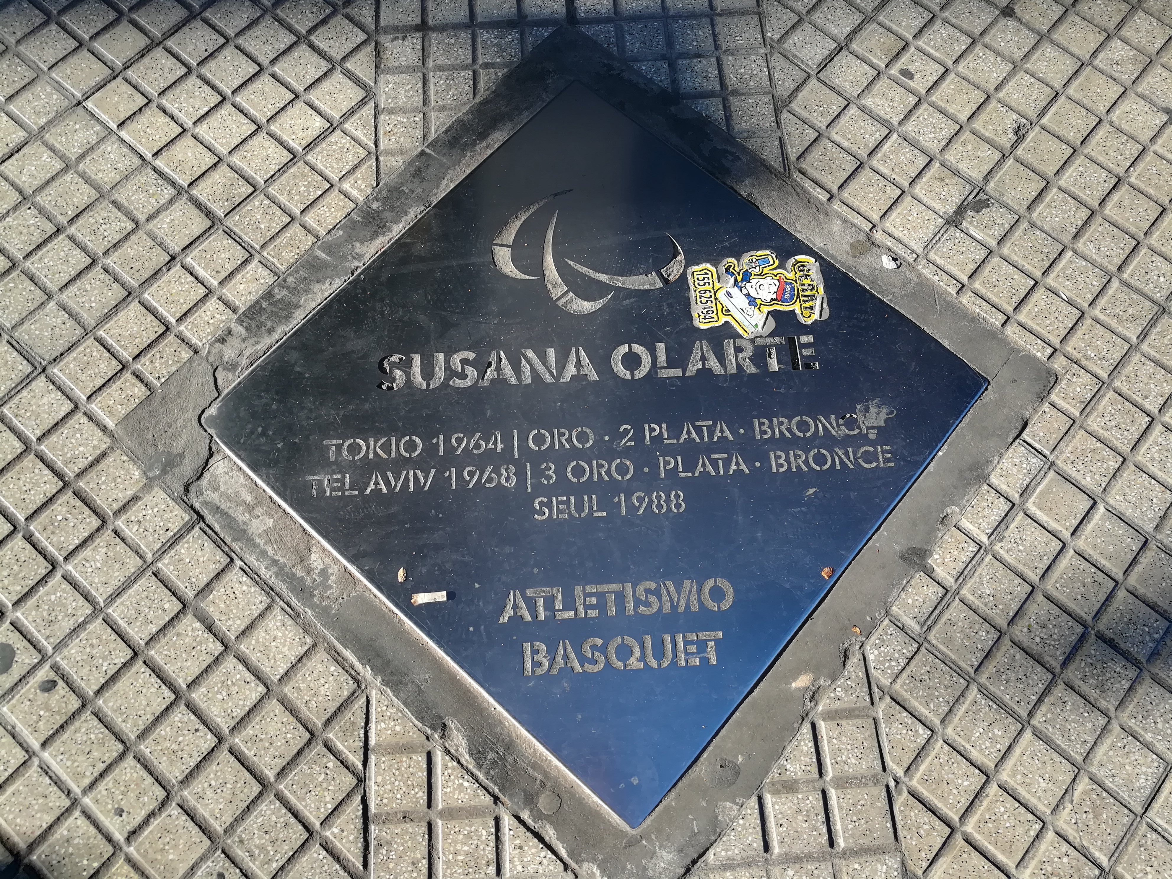 Paseo de los Olímpicos de los en la Avenida Pellegrini (Rosario).